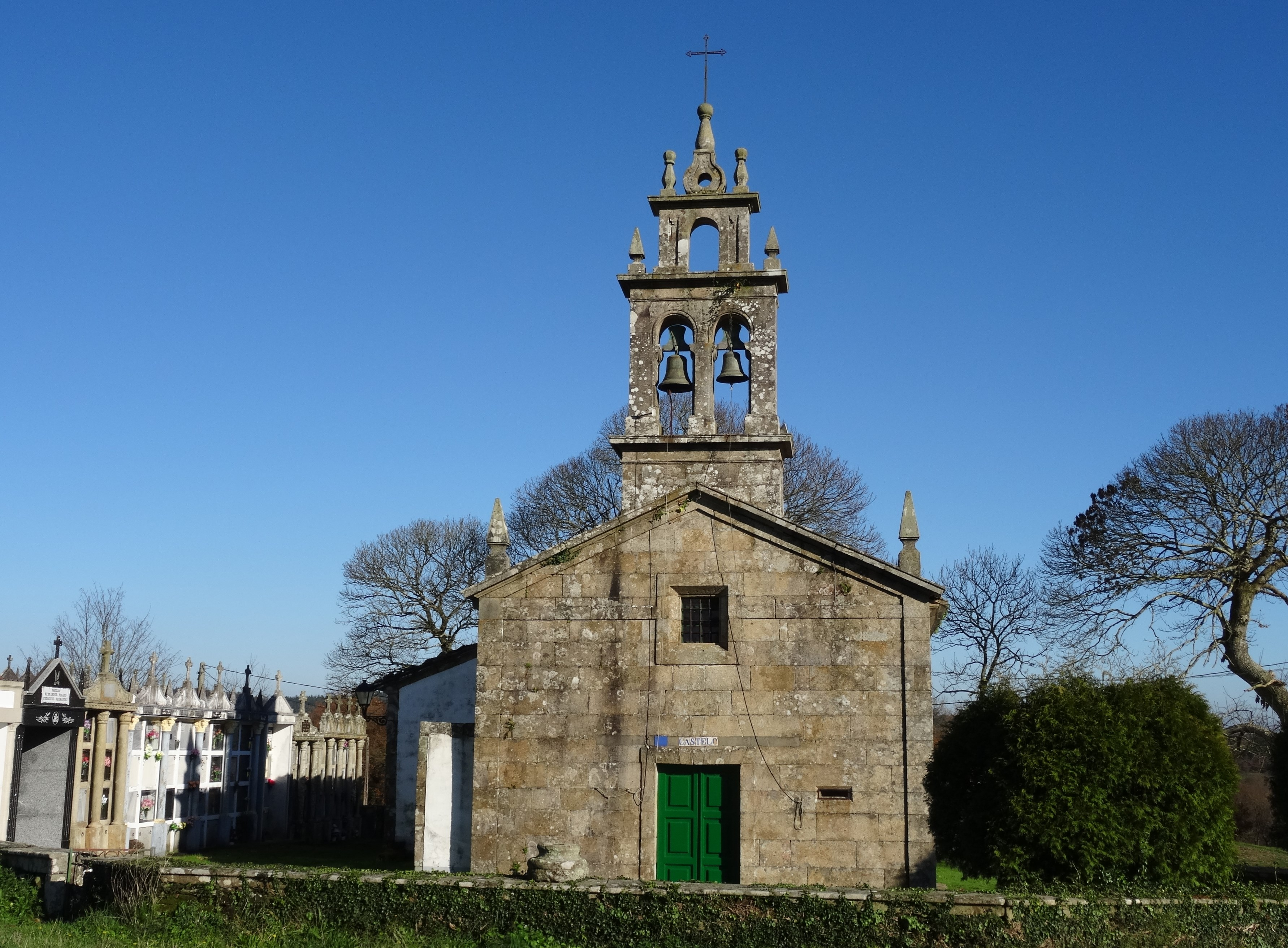 Igrexa de Santa María de Castelo, Trazo.